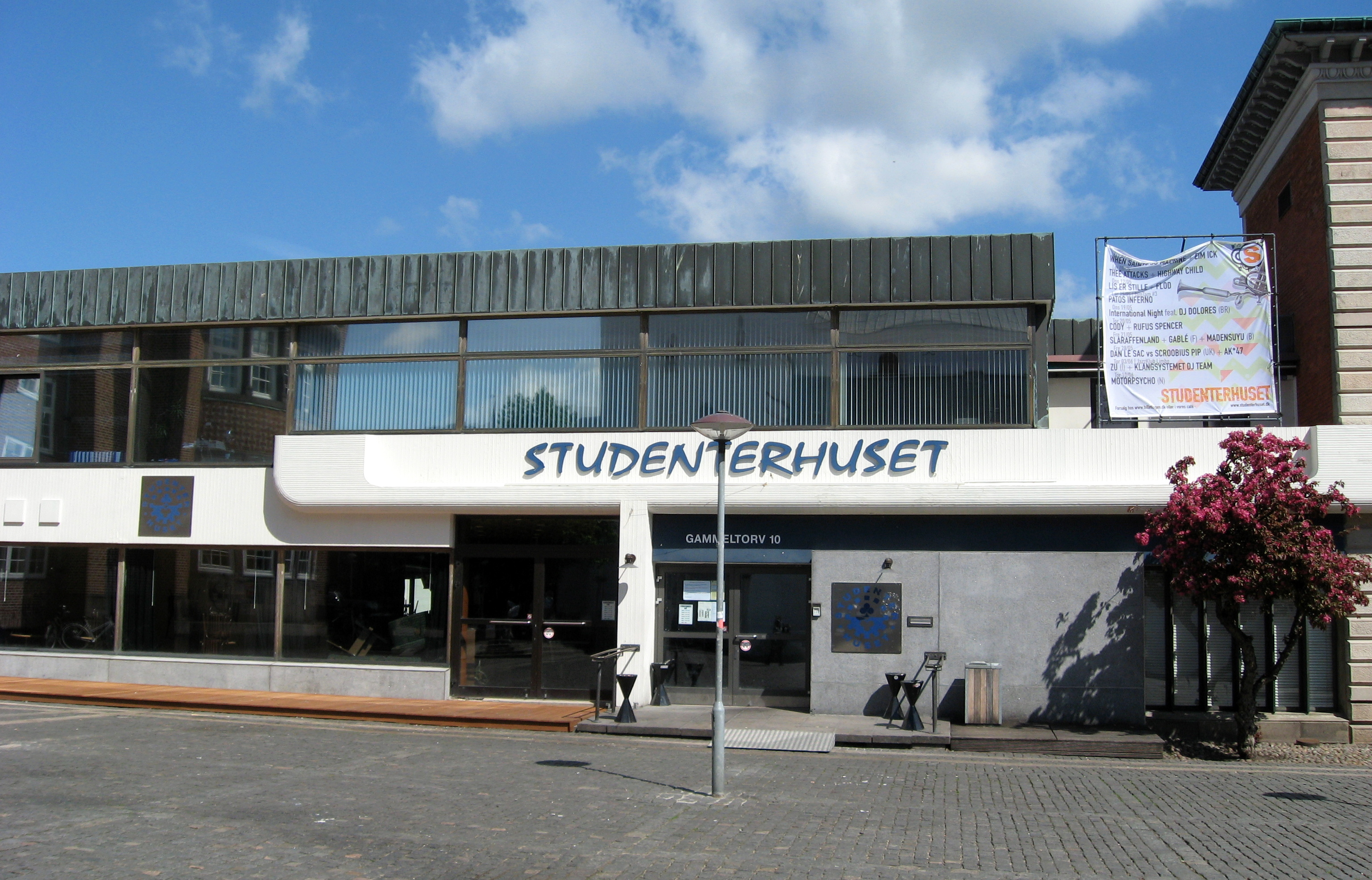 Studenterhuset, Aalborg